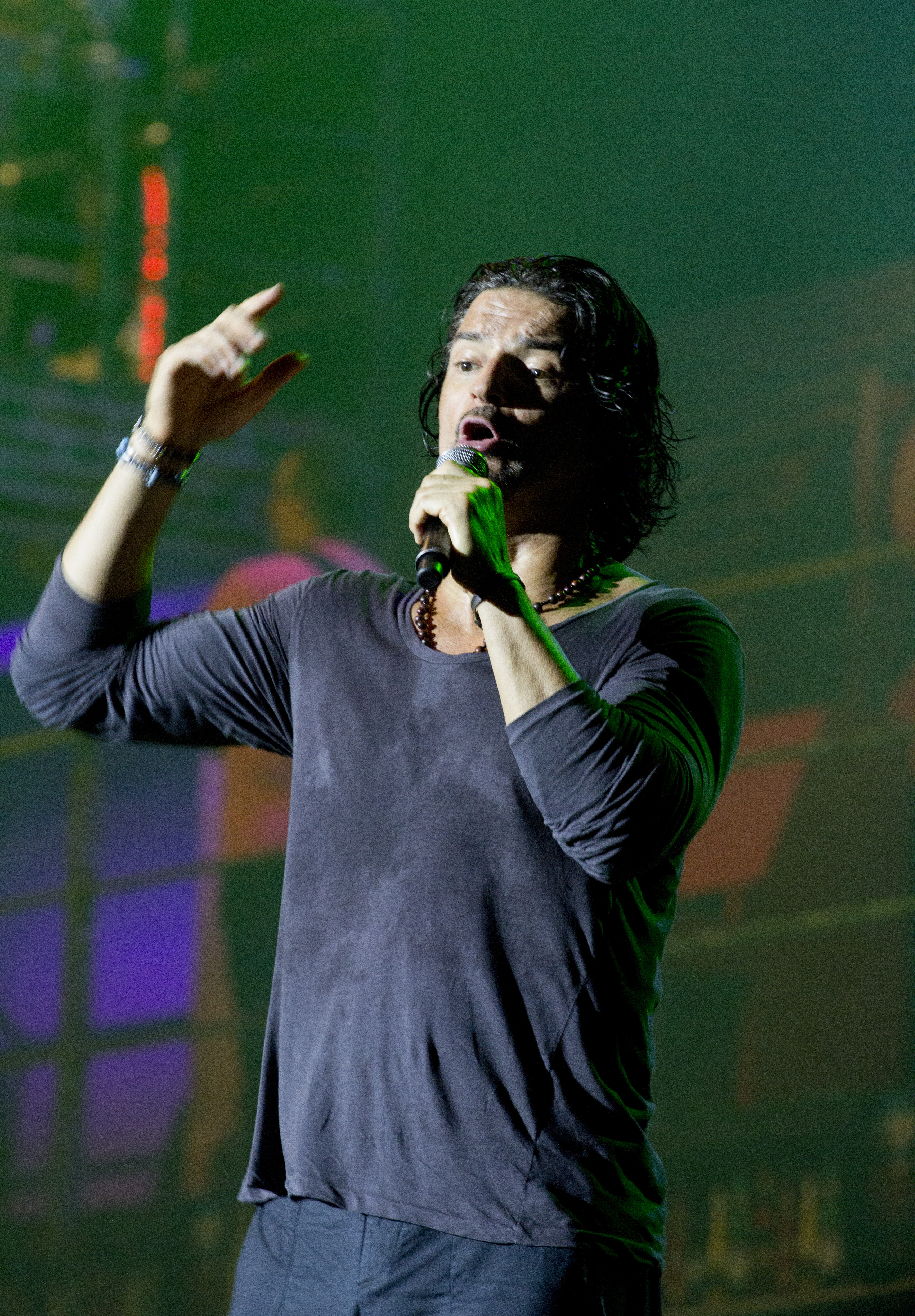 Ricardo Arjona en Nicaragua